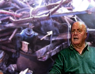 Portrait de Albert Féraud